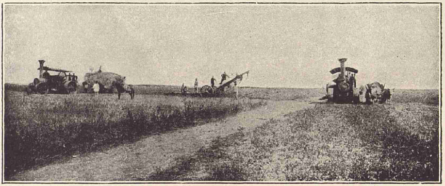 Reproducerea unei fotografii din anii 30 ai secolului XX